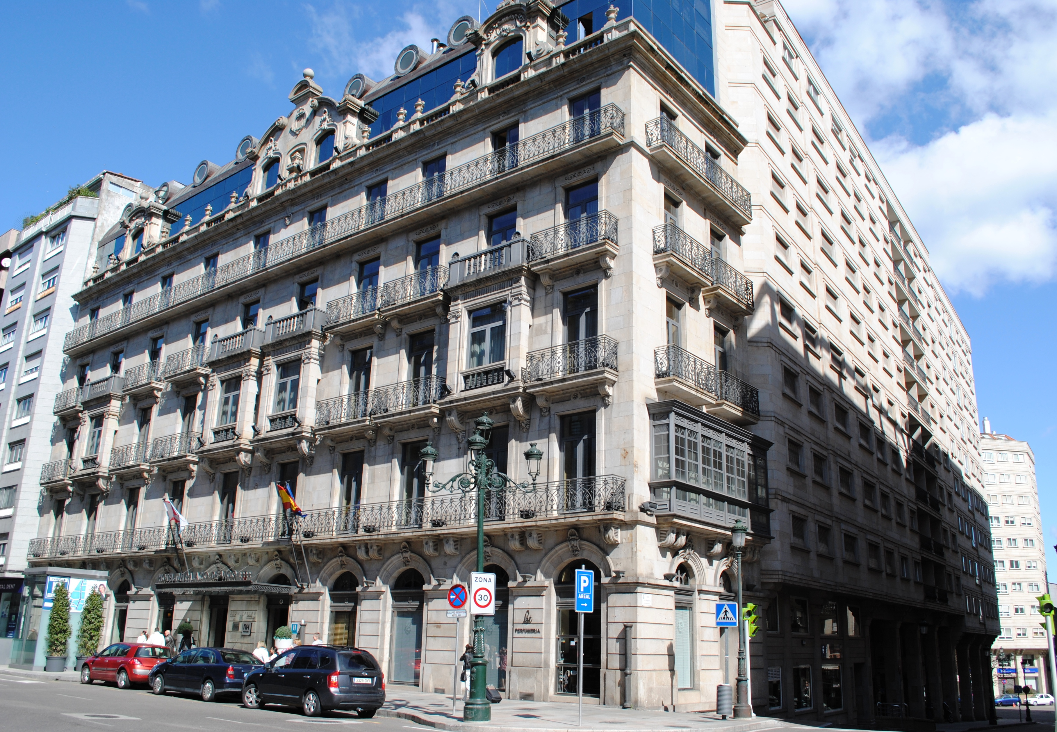 Hotel NH Palacio de Vigo****, arquitectos M Pacewick 1904, A Iglesias - M J Maldonado 1998.